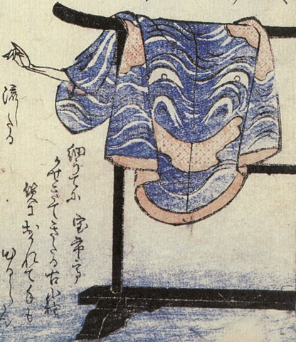 Kosodenote (小袖の手) from the Kyōka Hyaku Monogatari (狂歌百物語)